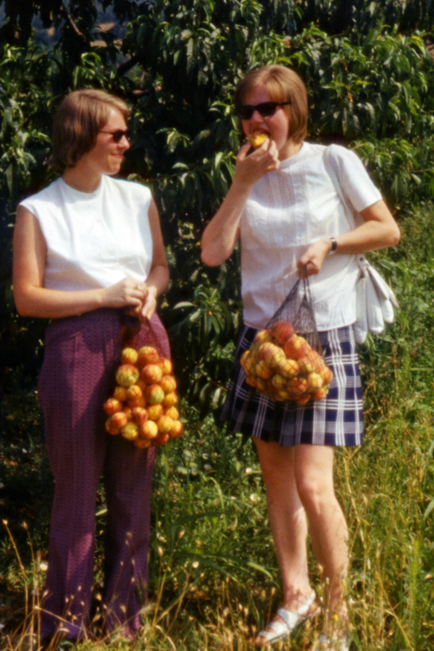 Eine Jugendtouristreise 1974 nach Bulgarien enthielt den Besuch einer Landwirtschaftlichen Produktionsgenossenschaft (LPG) in der Nähe der Stadt Враца (Vratza). Der LPG-Vorstand lud zu dem Besuch einer Pfirsichplantage ein. Die damals verbreiteten Einkaufsnetze aus der DDR waren praktisch zur Mitnahme der reifen Früchte.